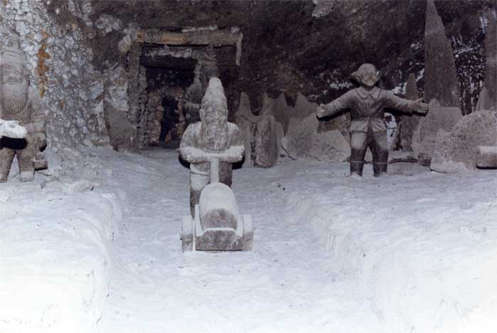 Foto gemaakt op 21 augustus 1993, gedigitaliseerd op 17 november 2006.